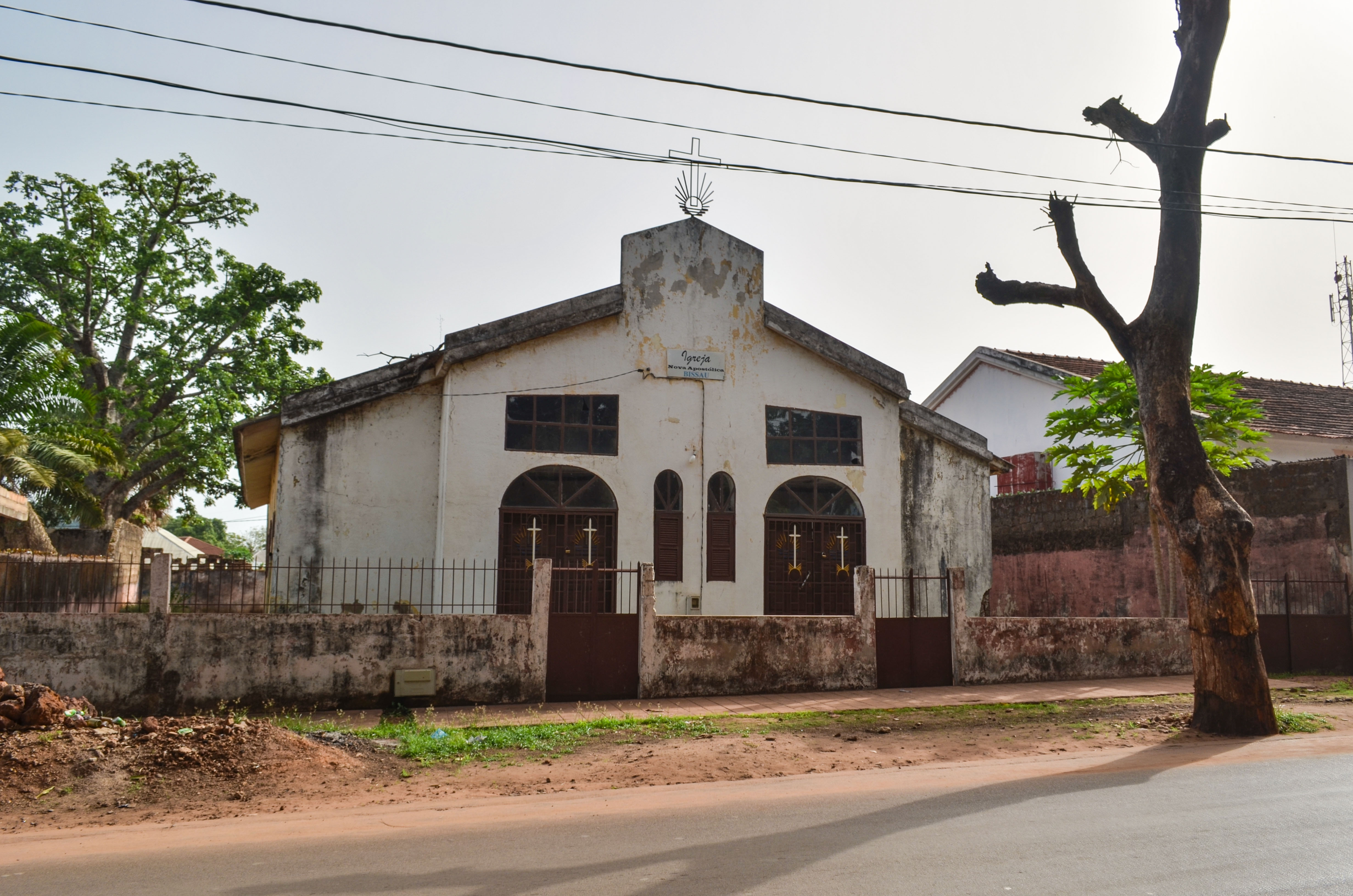 20130610-DSC_8996